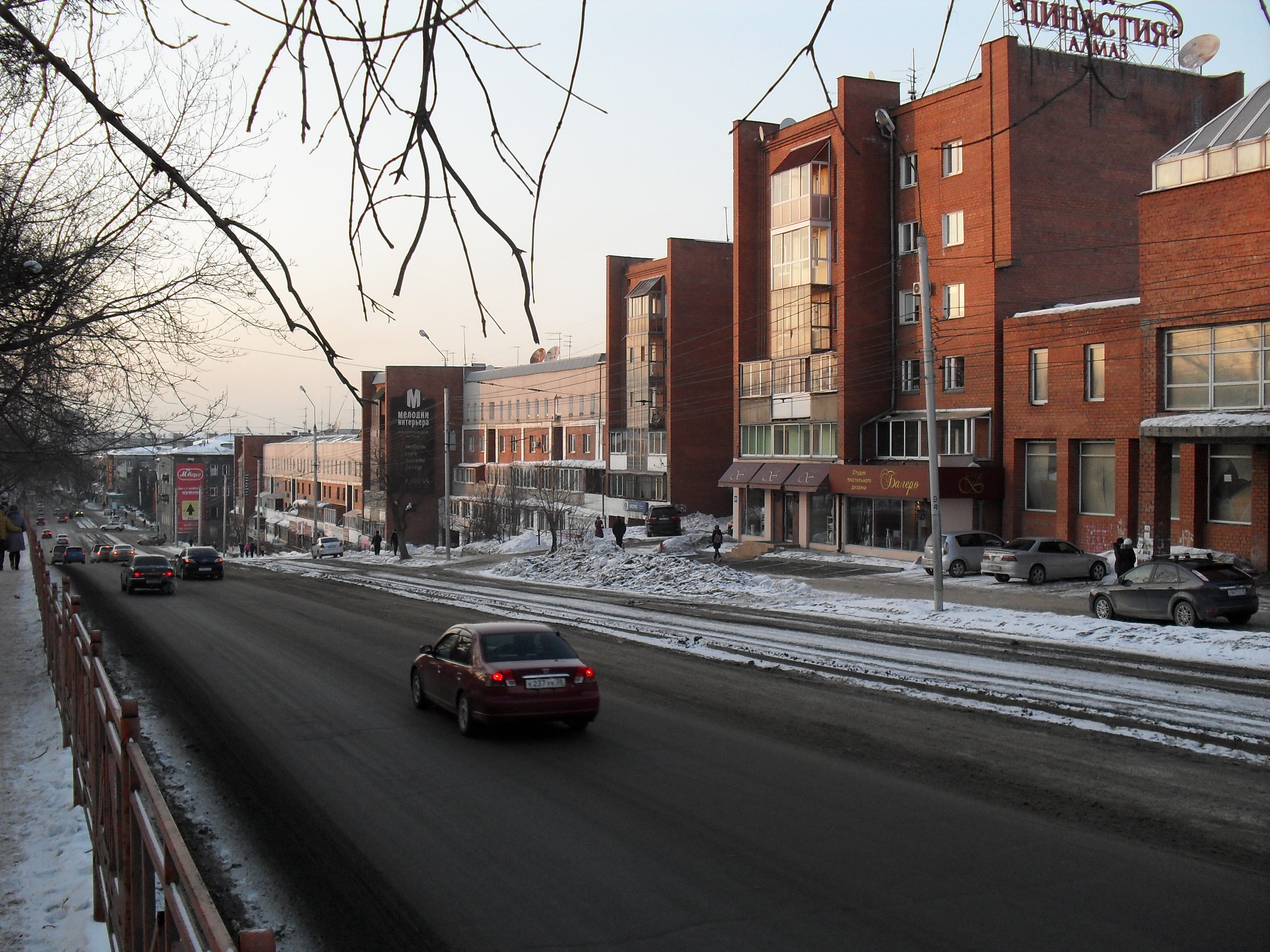 Иркутск. Иркутск. Улица Декабрьских событий.